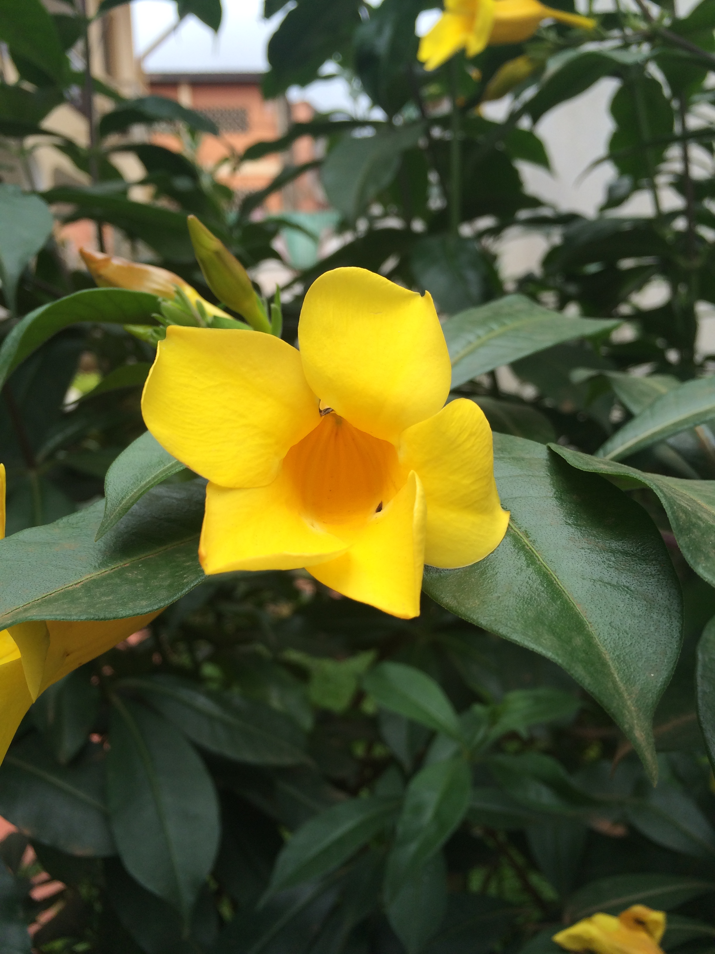 Cette image représente une variante d'Allamanda qu'on retrouve dans la région du Centre à Yaoundé au Cameroun